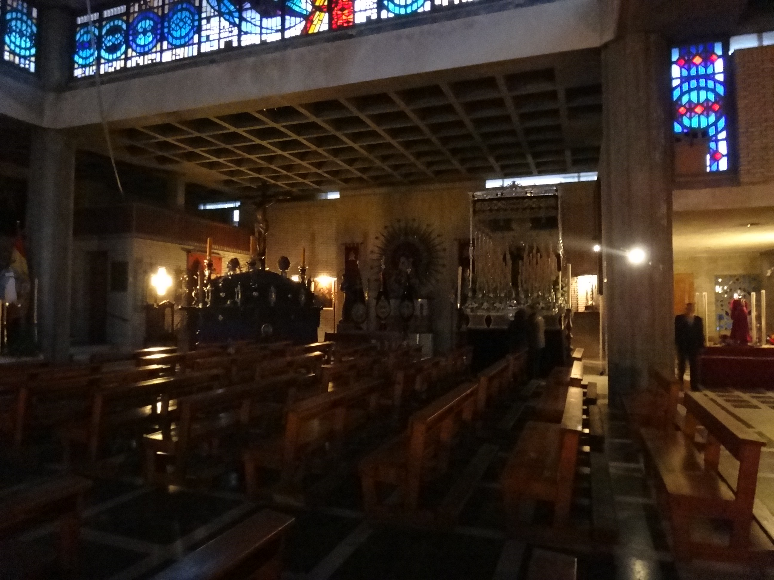 Iglesia de capuchinos en Jerez (Andalucía, España)